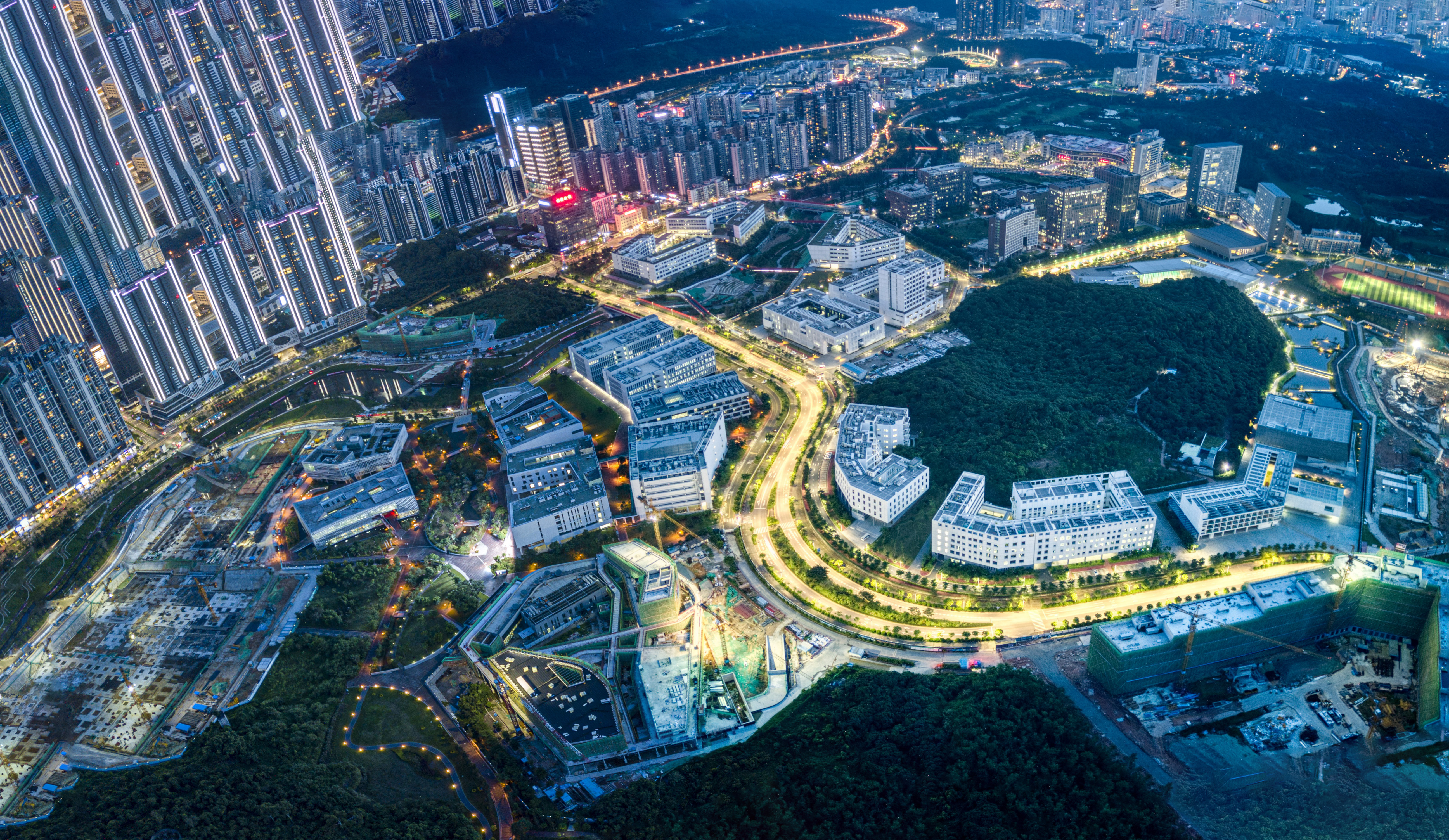 深圳大学城东区的航拍夜景